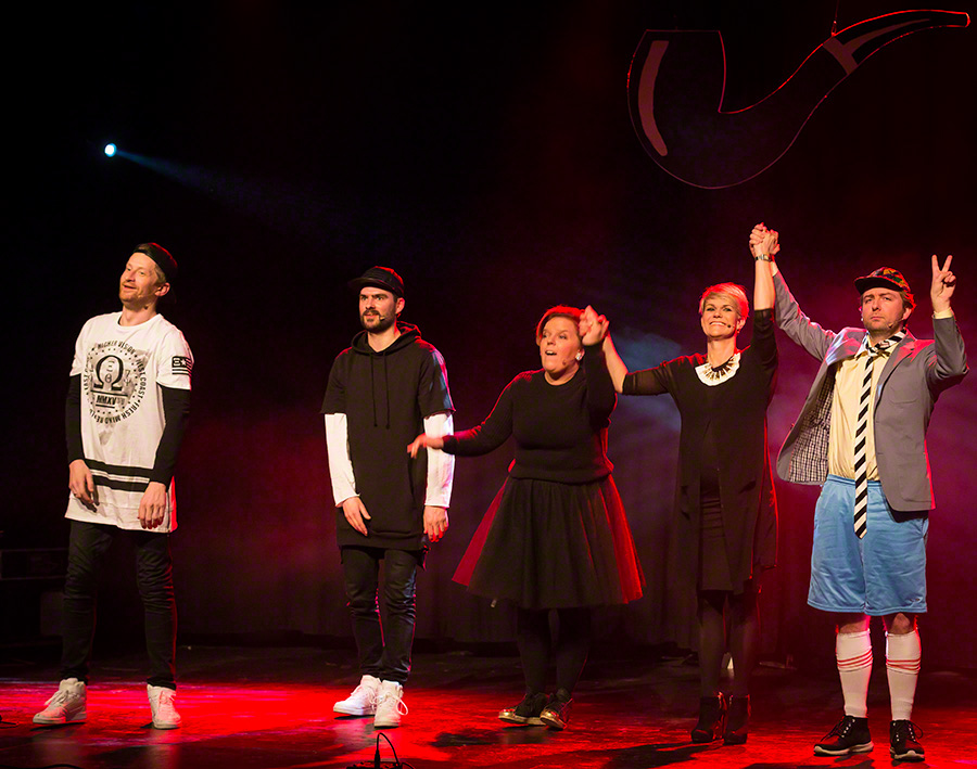 Undergrunnshowet Blymandag der Sigrid Bonde Tusvik, Else Kåss Furuseth, Henrik Thodesen, Odd-Magnus Williamson og Martin Beyer-Olsen er med. Blymandag sees på som forløperen til tv-programmet Torsdag kveld fra Nydalen.